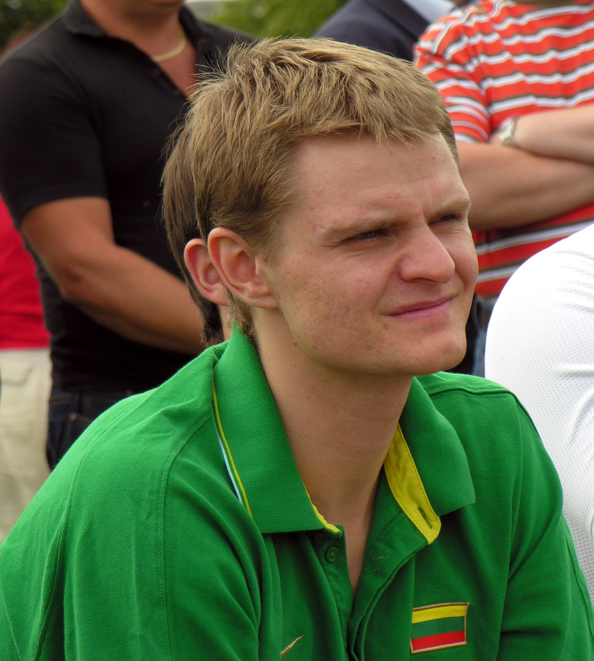 Renaldas Seibutis, Nacionalinės vyrų krepšinio rinktinės susitikimo Mažeikiuose metu 2009 m. liepos 31 d.